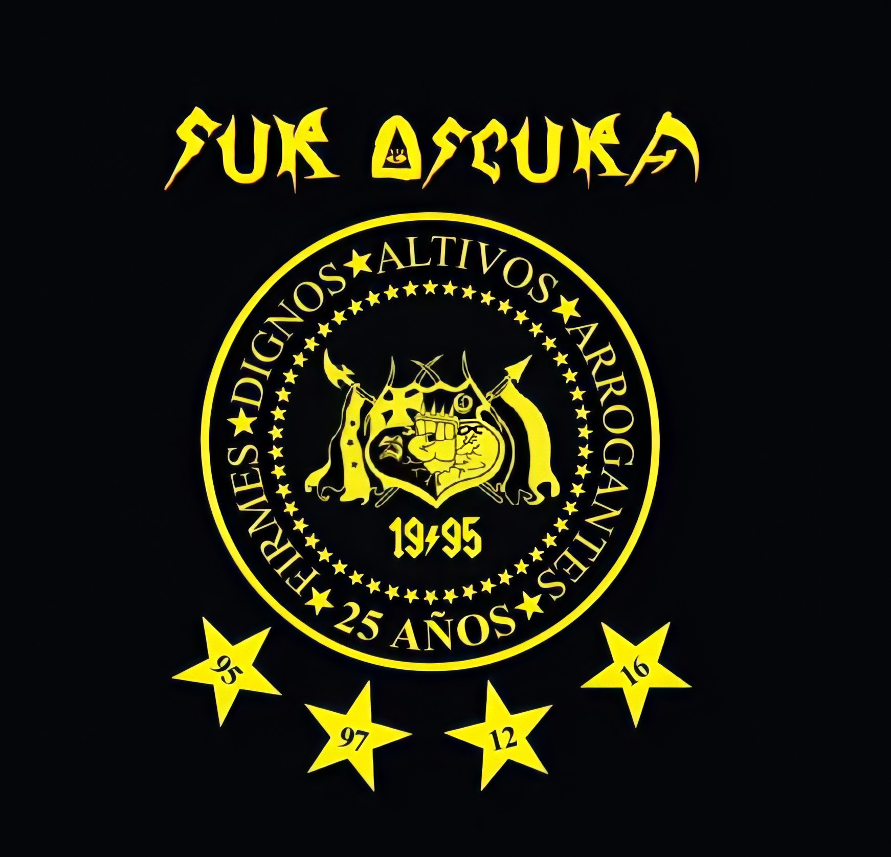 Logo de la Sur Oscura por su Aniversario número 25